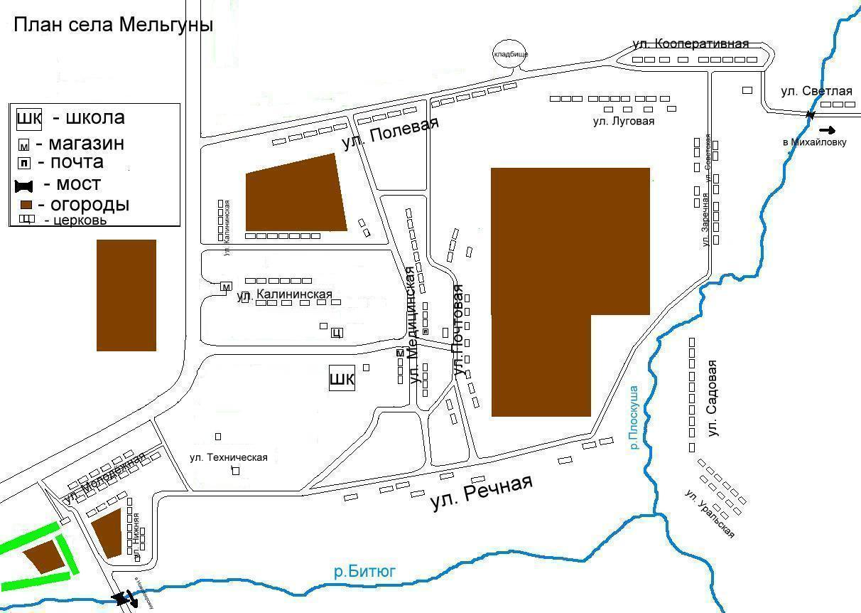 План села Мельгуны